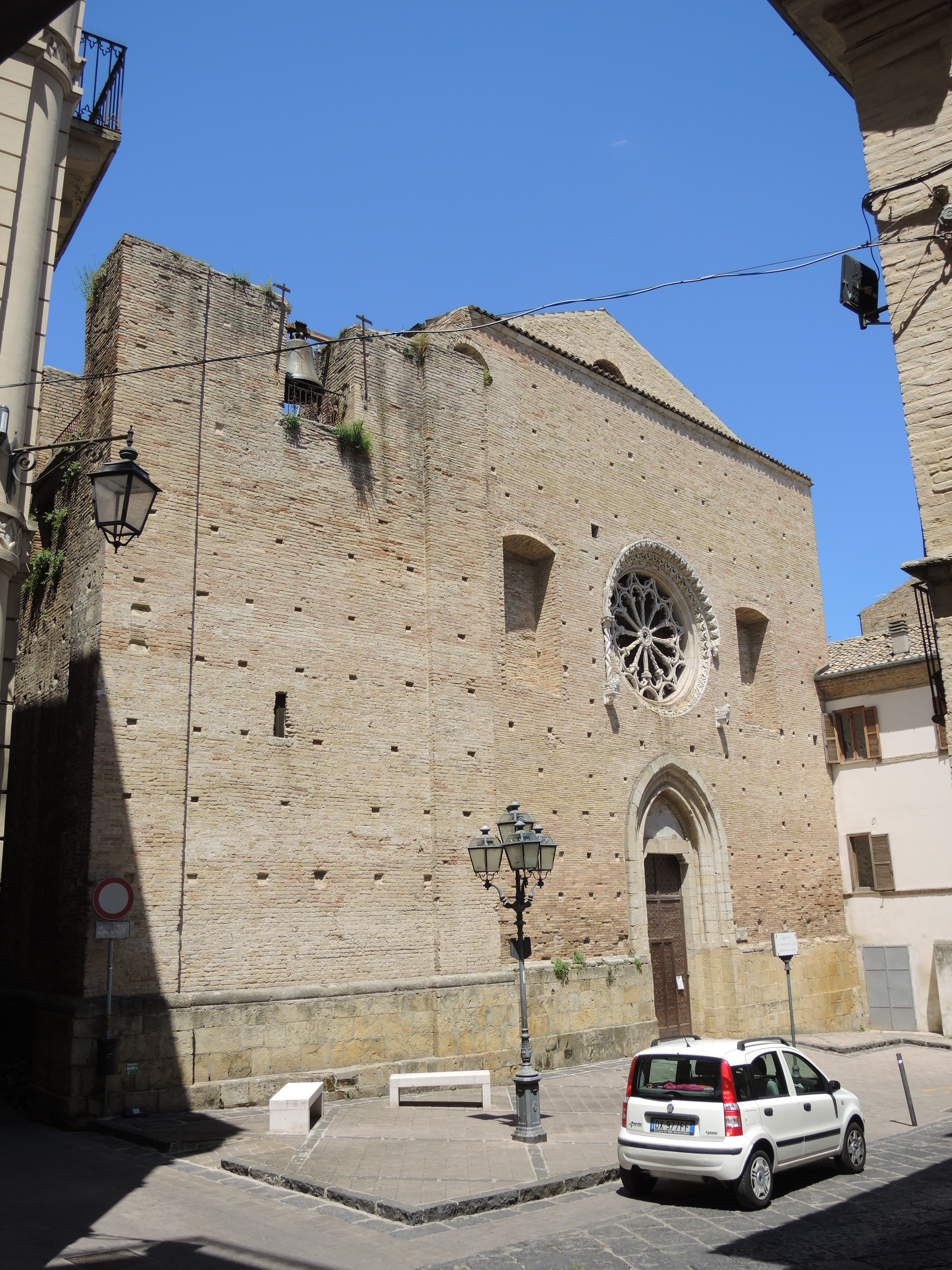 Lanciano - Chiesa di Santa Lucia